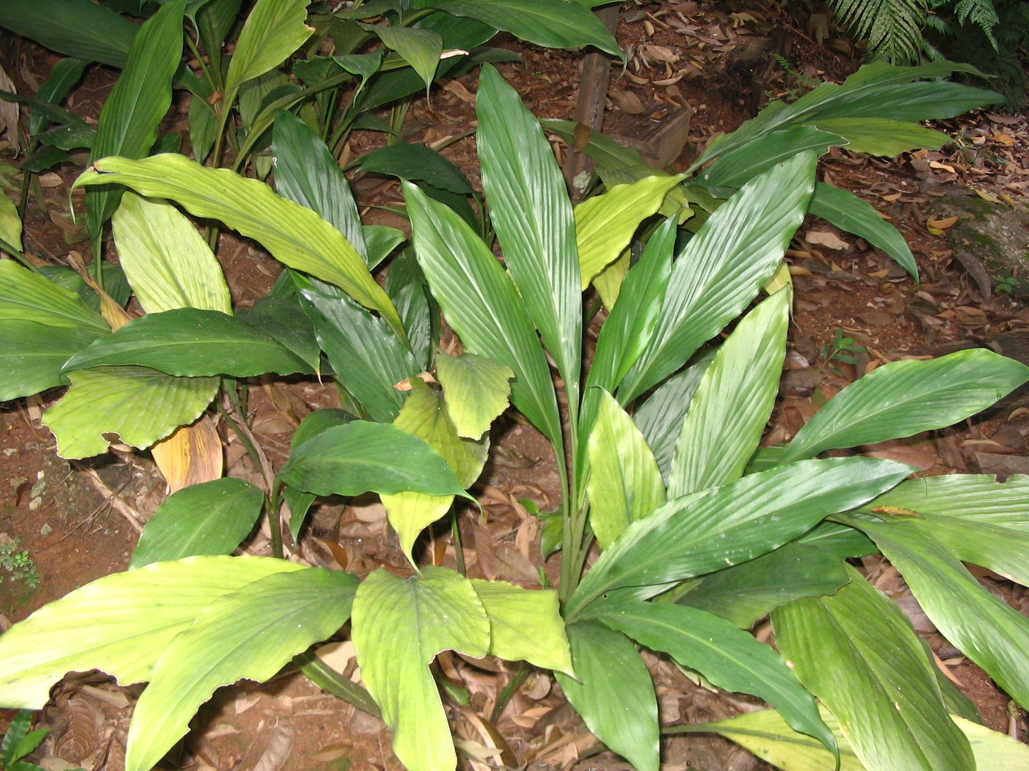 Elettariopsis curtisii - Bukit Nanas Forest Reserve - Kuala Lumpur